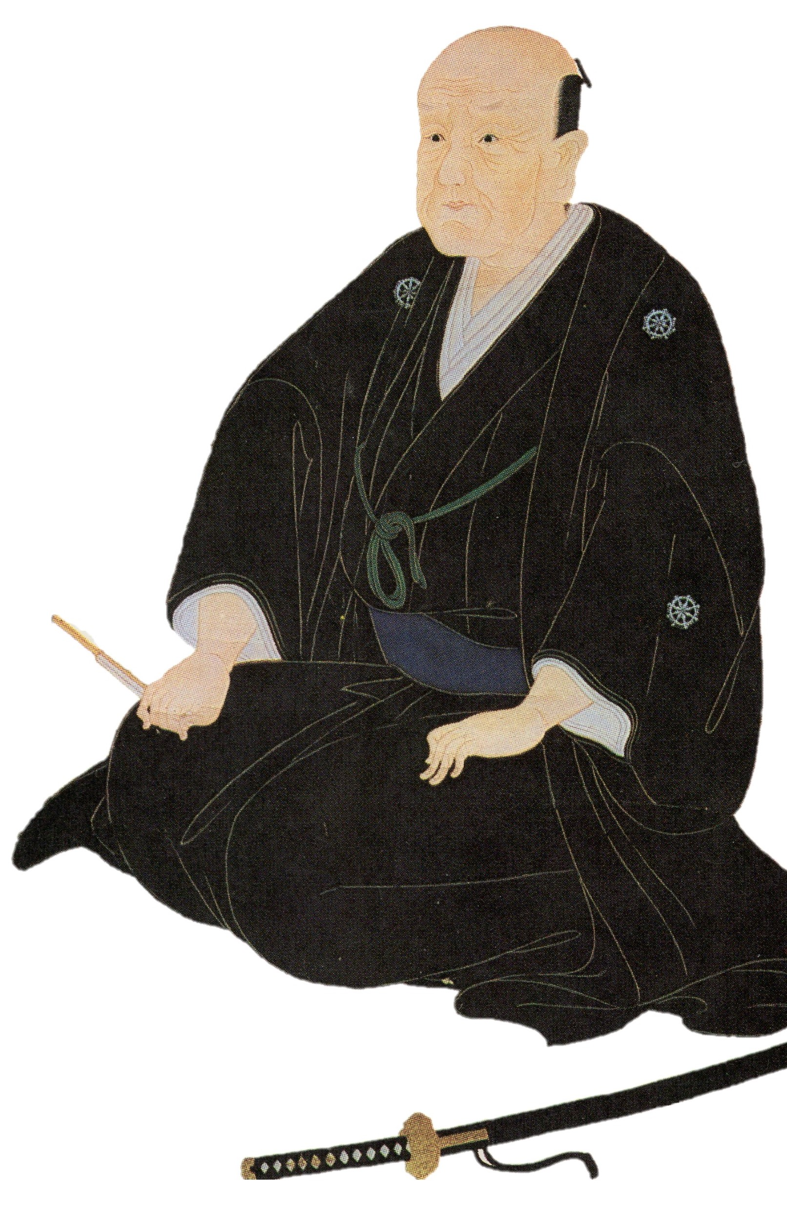 田原藩主三宅康之の肖像(切り抜き)。